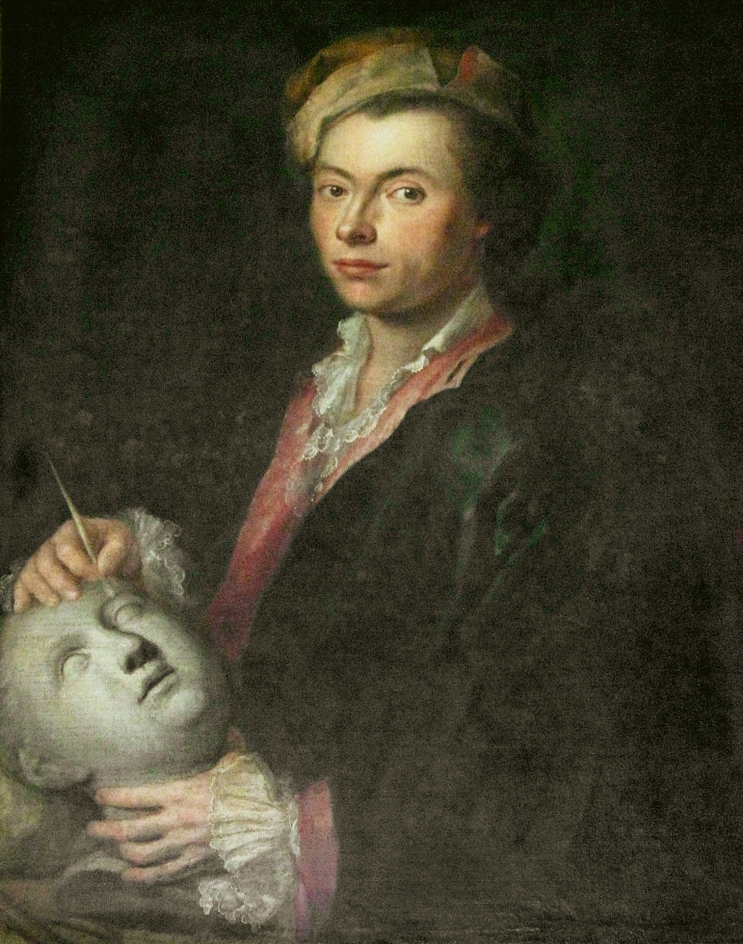 Joseph Weiß: Dominikus Auliczek, Ölgemälde, um 1770, Porzellanmuseum München